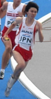 Mistrzostwa Świata Juniorów w Lekkiej Atletyce Bydgoszcz 2008